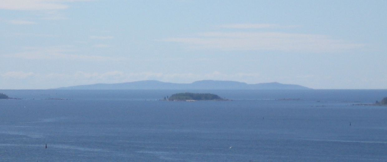 Suursaari (Hogland), as seen from Kotka.